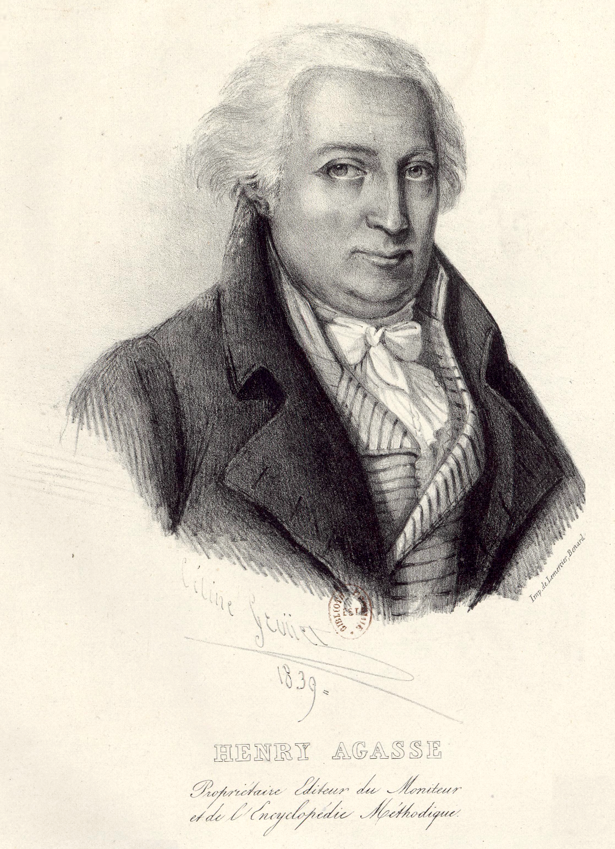 Appartient à l’ensemble documentaire : IconEST2